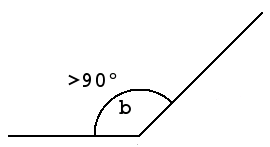 Obtuse angle